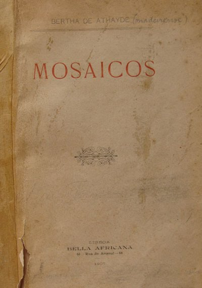 Capa do livro Mosaicos, 1907